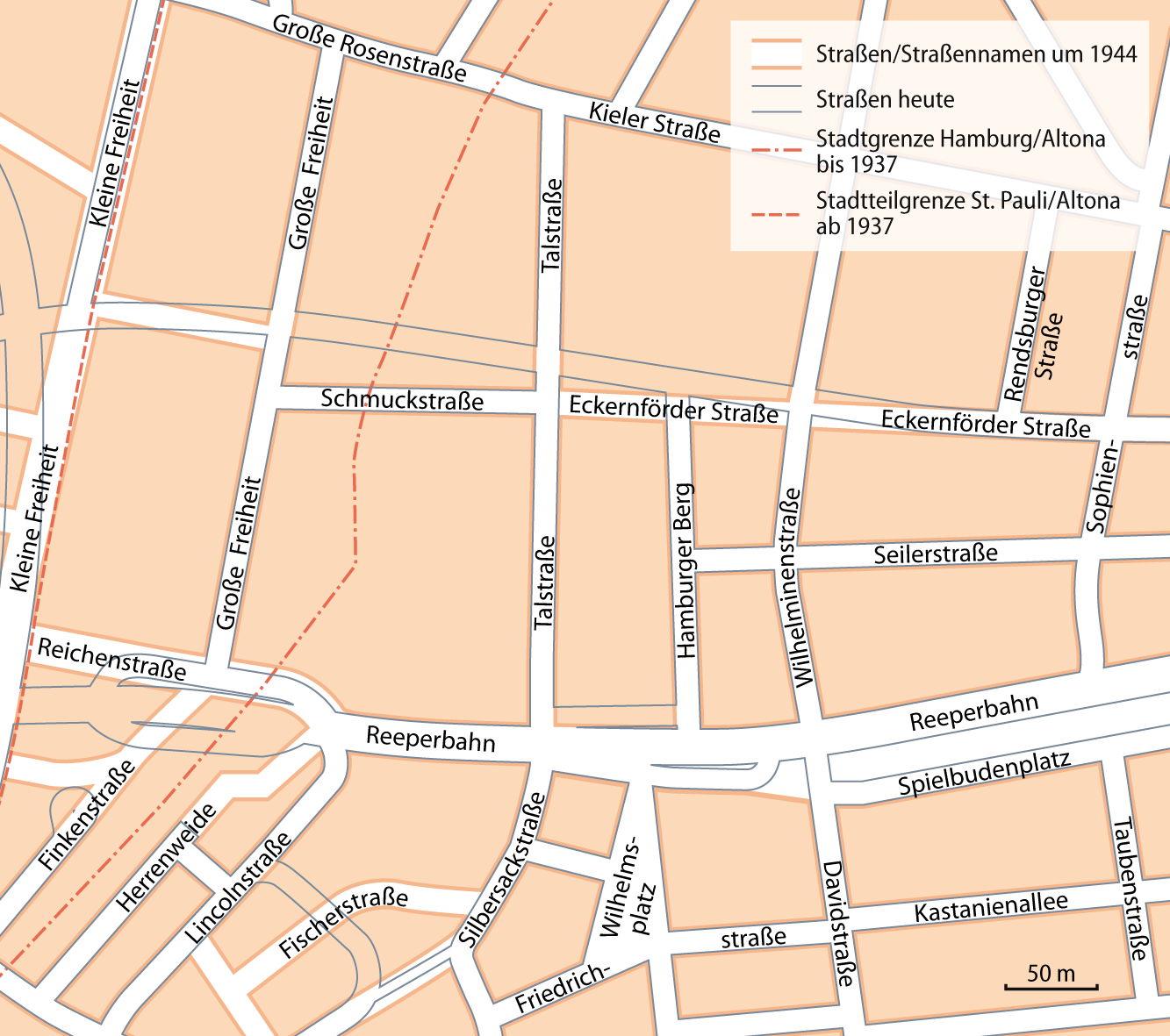 Karte des Chinesenviertels in Hamburg um 1944